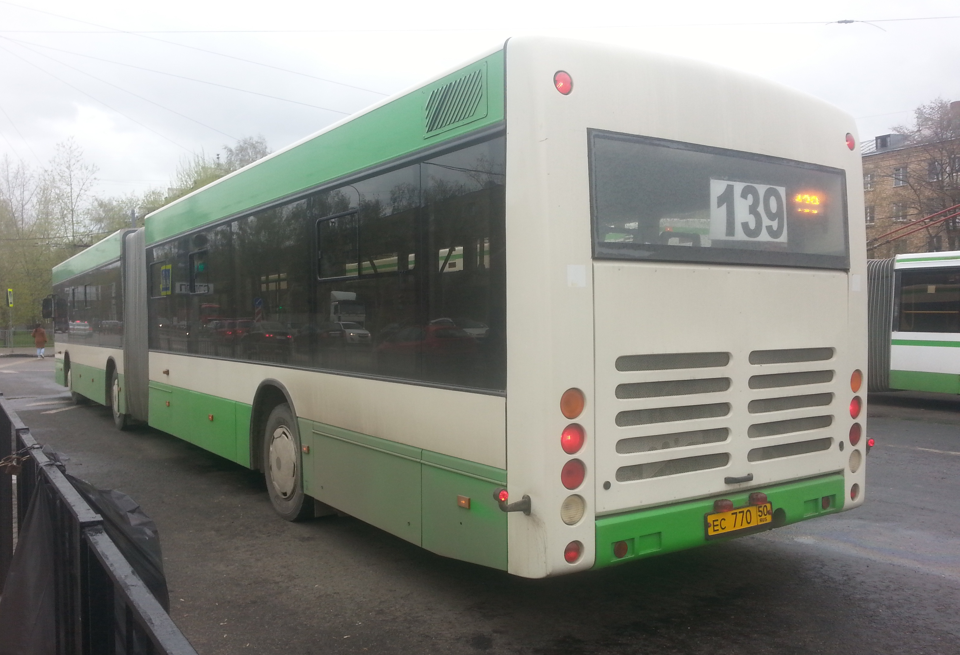 Сочлененный автобус Волжанин-6271 «СитиРитм-18» в Москве, маршрут 139